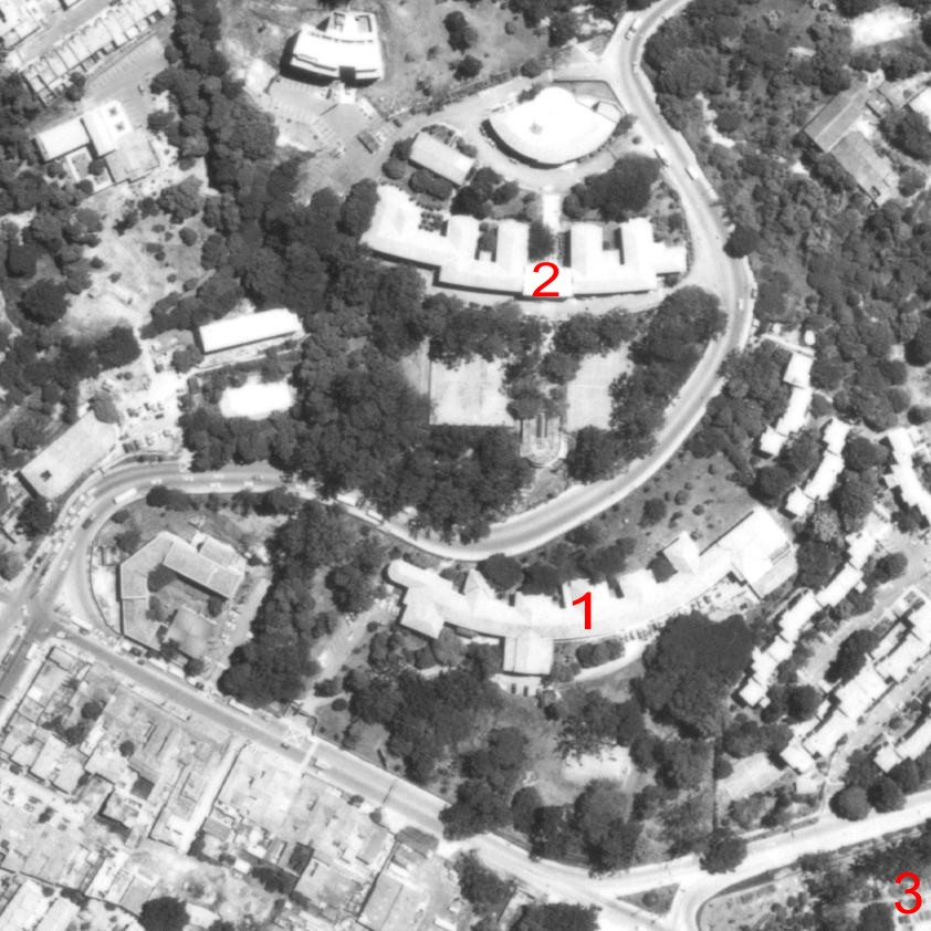 Vista aérea de la Institución Universitaria Colegio Mayor de Antioquia (1), facultad de minas de la Universidad Nacional (2) sede Barrio Robledo, Medellín y la facultad de medicina Veterinaria (3) de la Universidad de Antioquia. Se puede apreciar que las plantas tanto del Colegio Mayor como la facultad de minas, están configuradas a partir de ejes en líneas curvas, adaptándose a la topografía inclinada del terreno.